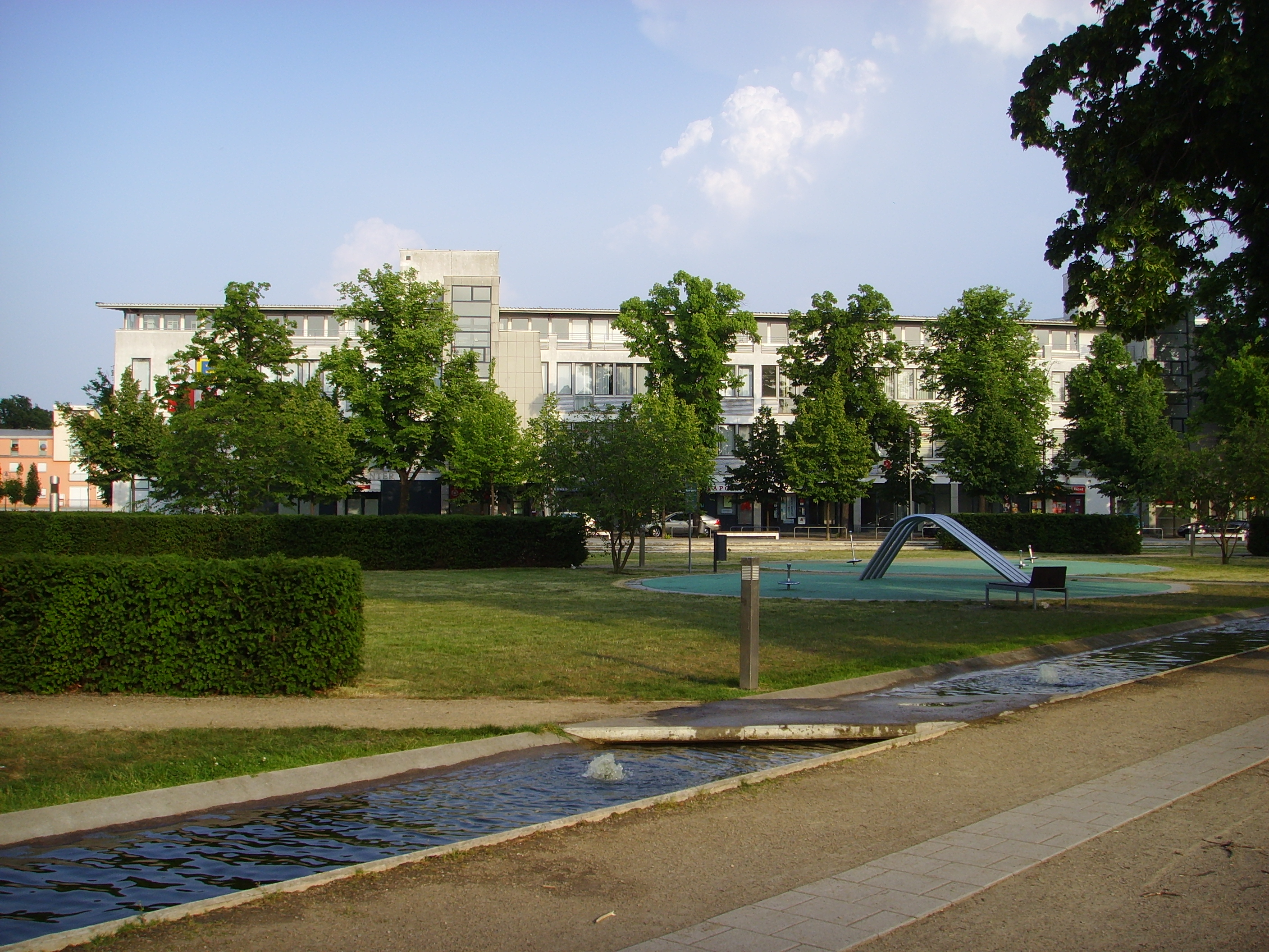 Neumarkt in Senftenberg